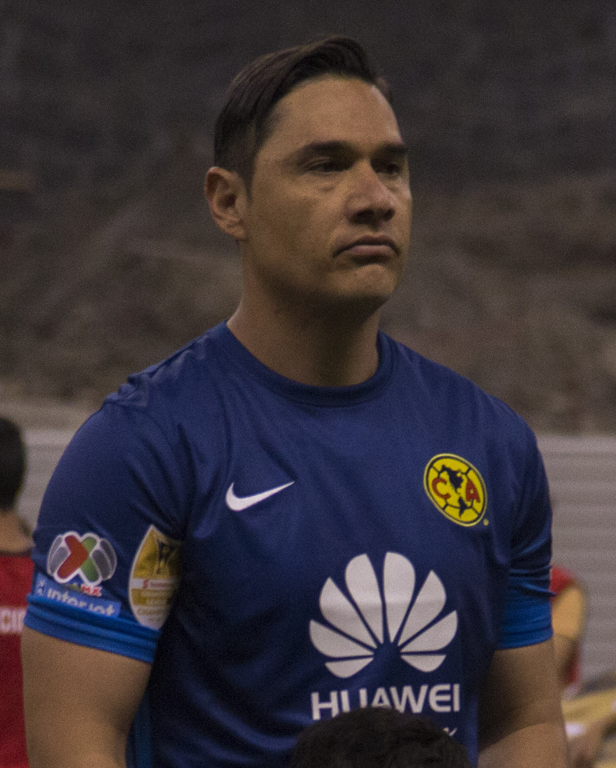 América vs Santos